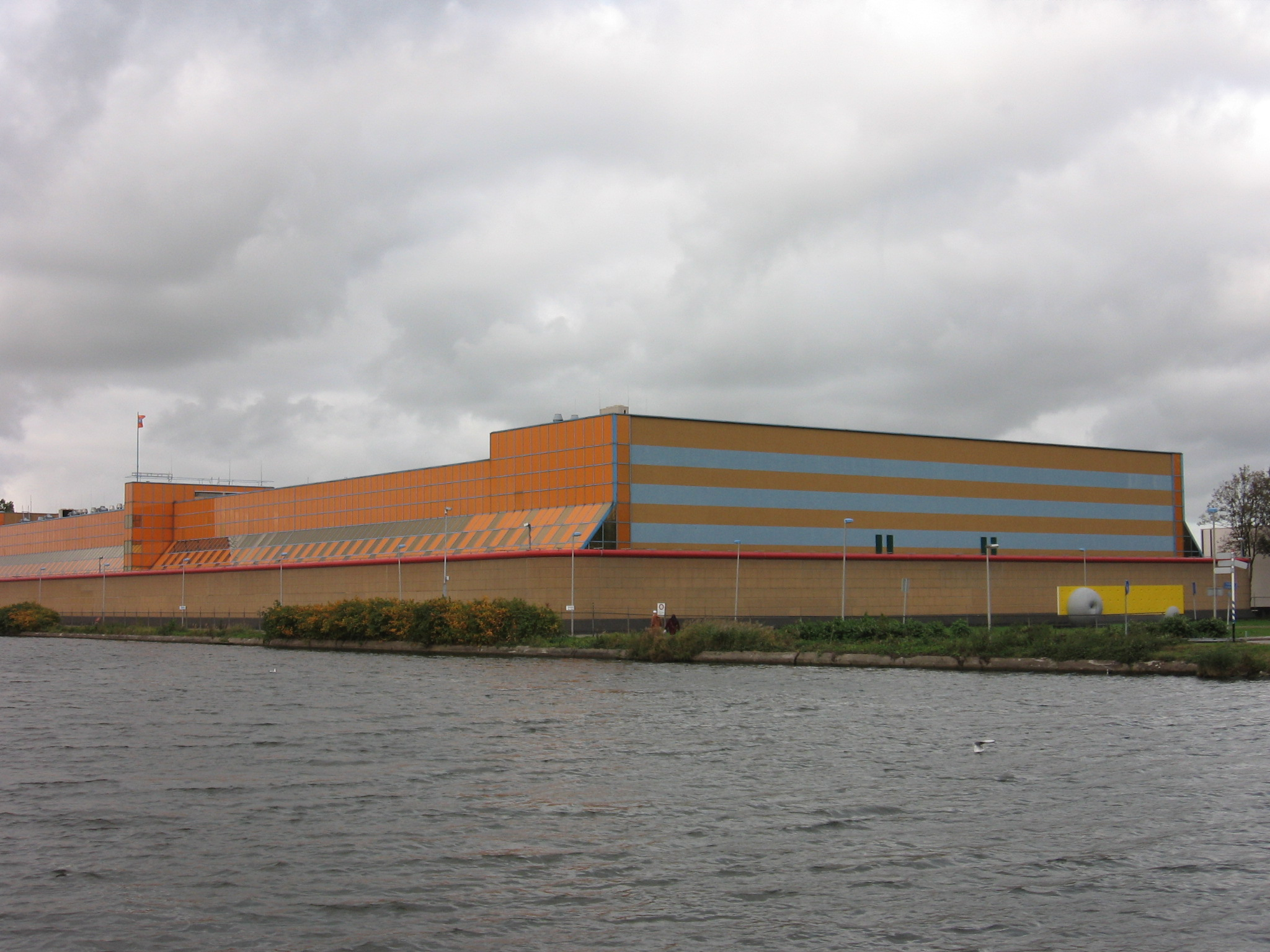 Gevangenis ('prison'), P.I. de Schie